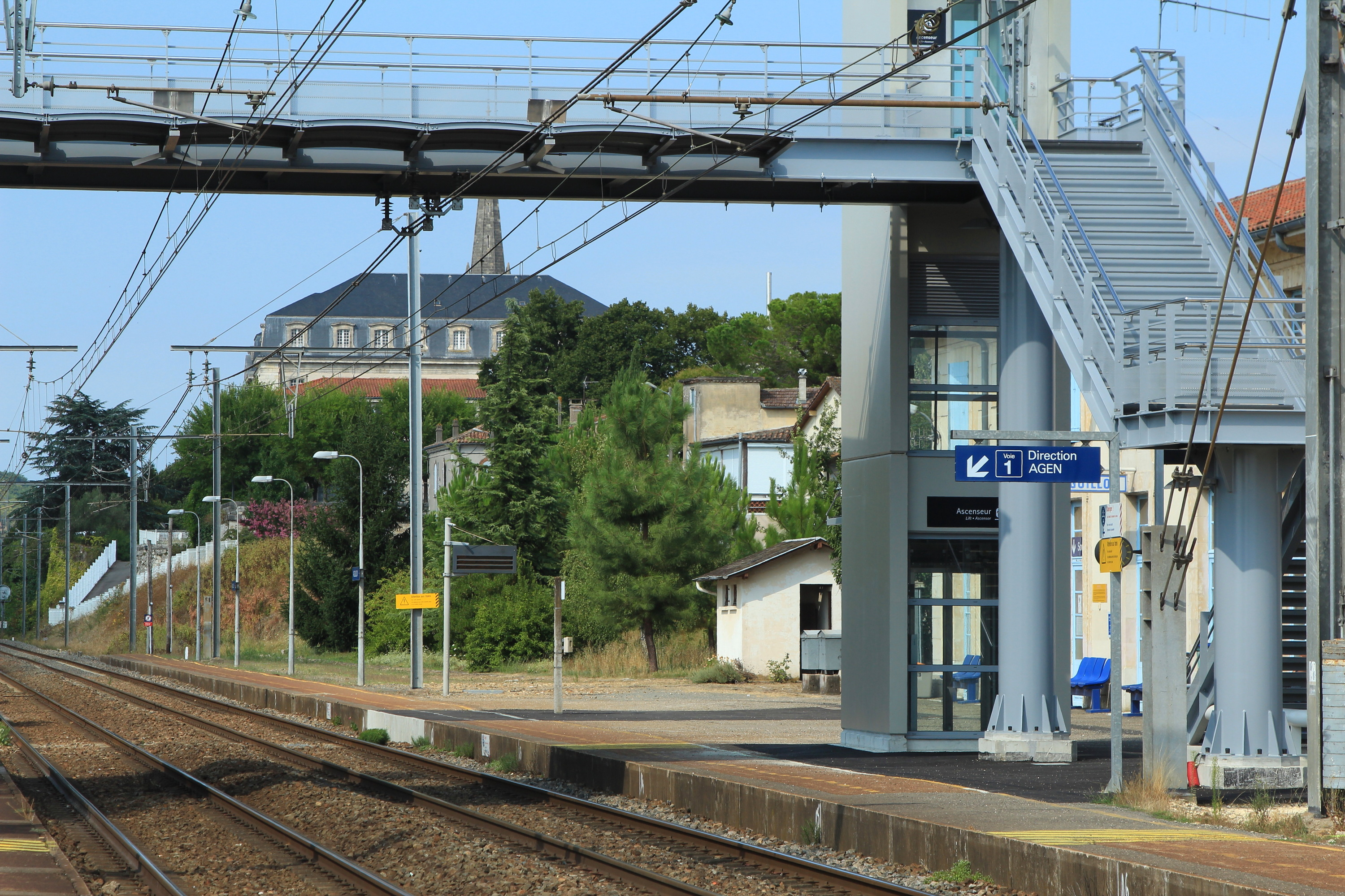 Le quai desservit par les trains à destination d'Agen de la gare d'Aiguillon, vu en direction de Marmande.